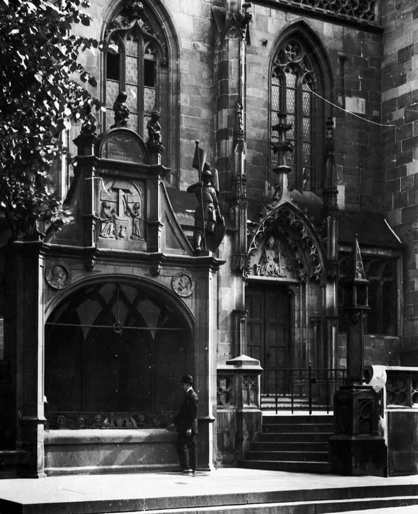 Siebenröhrenbrunnen in Heilbronn, ca. 1900